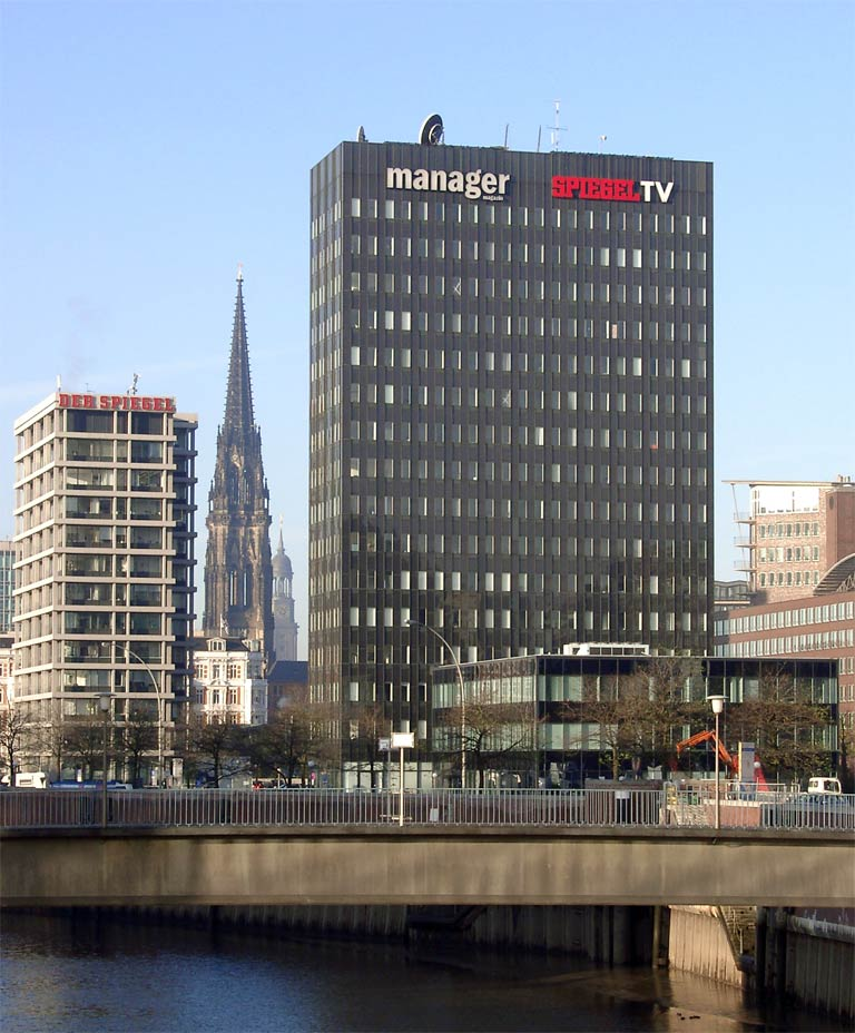 Der Spiegel, Verlagshaus Hamburg